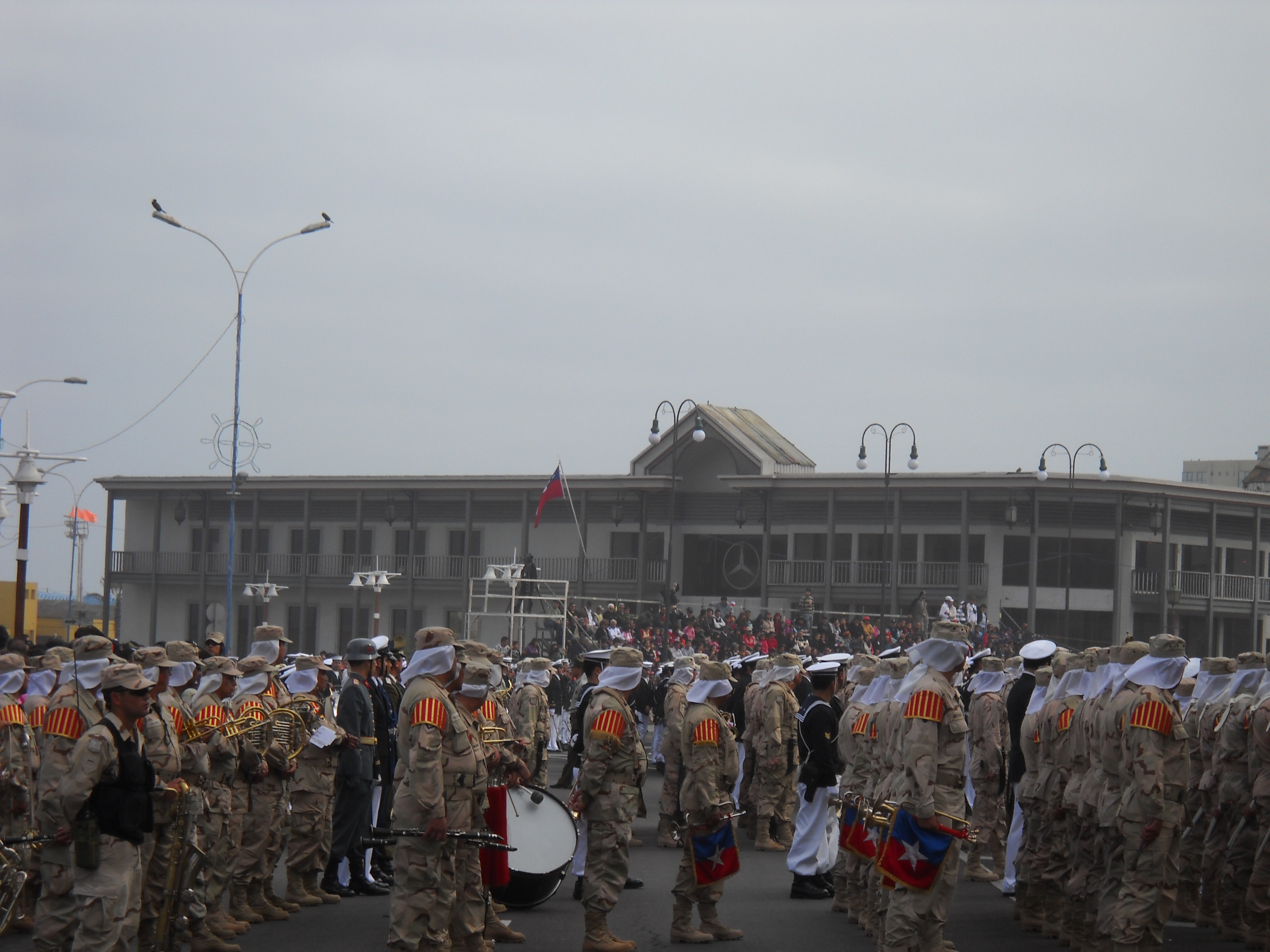 Banda militar en la celebración del Día de las Glorias Navales, en Iquique, Chile.